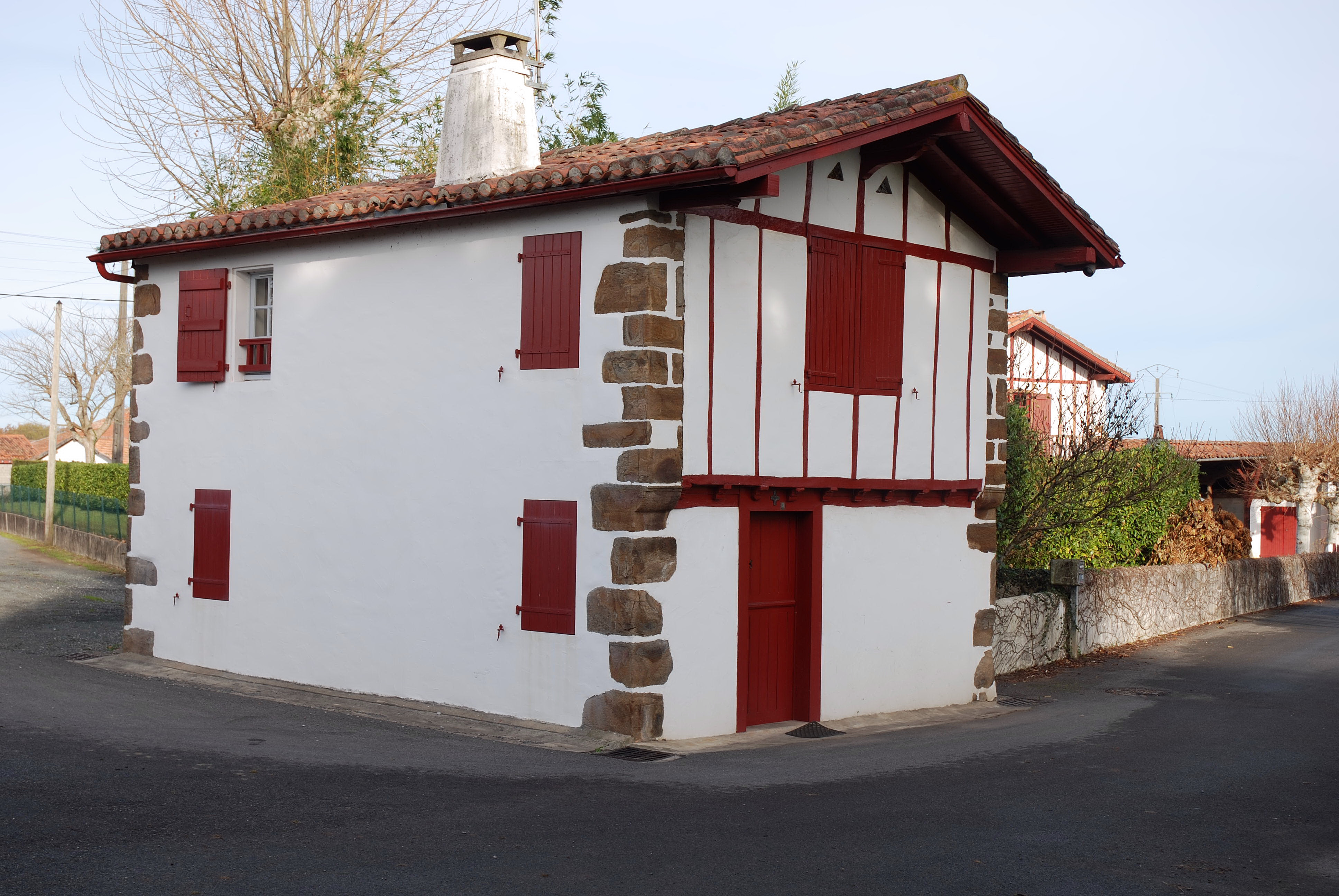 Jatxou, la benoîterie. Photo prise le 31/12/06 par Harrieta171